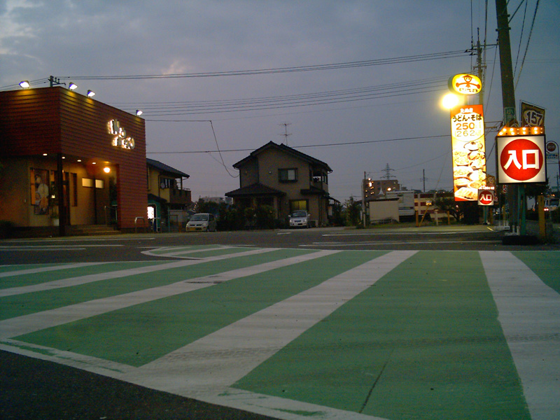 (Yamada-udon_Restaurant)_japan photography day, 2006.11.1. photography person kici 山田うどん